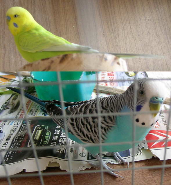 虎皮鹦鹉的黄色型和蓝色型 smartneddy摄并制作，自己养的